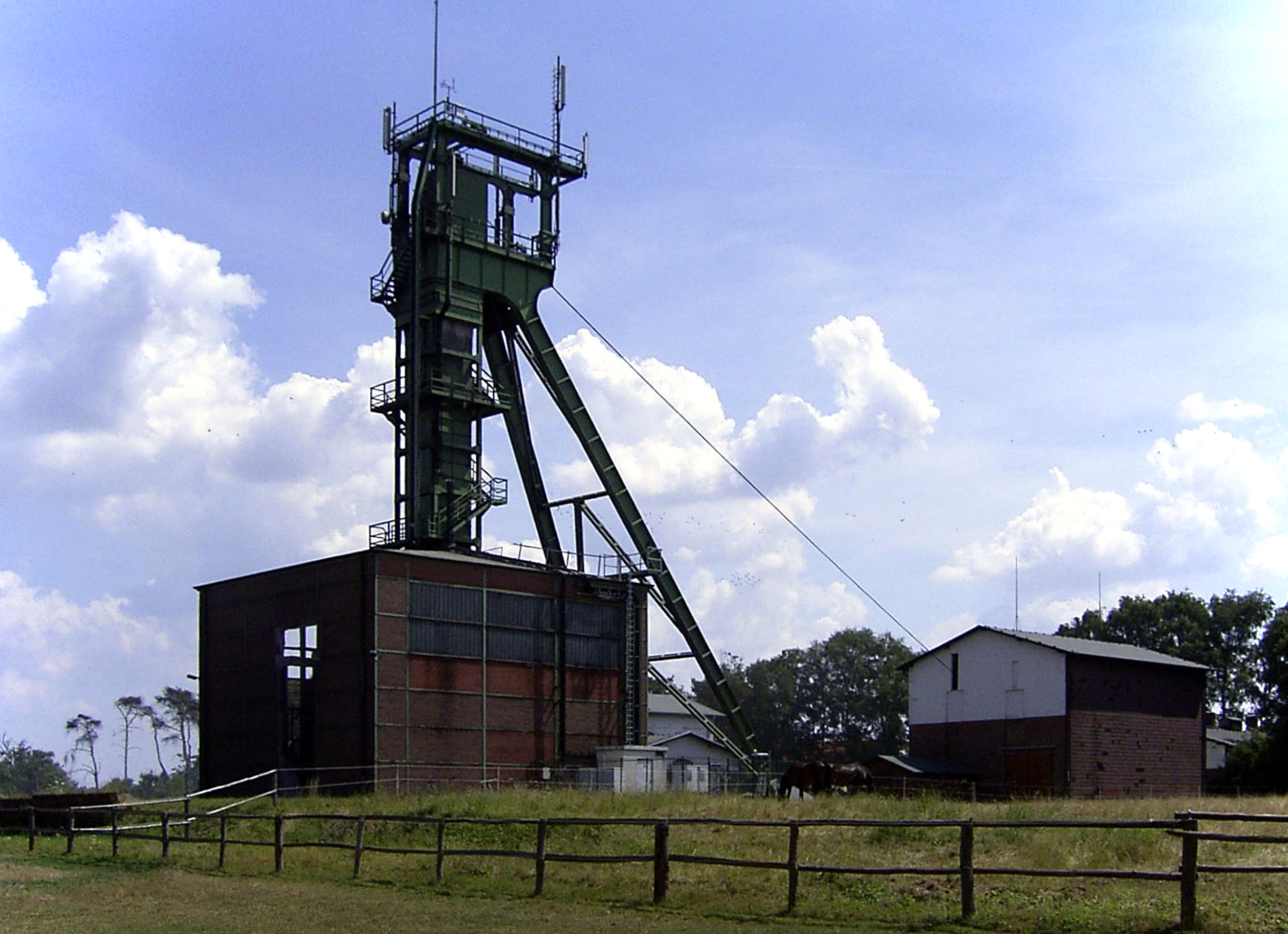 Der Wetterschacht Altenhagen, „Schacht Weser“, diente zur Belüftung der Kali-Schachtanlage Bokeloh bei Wunstorf.